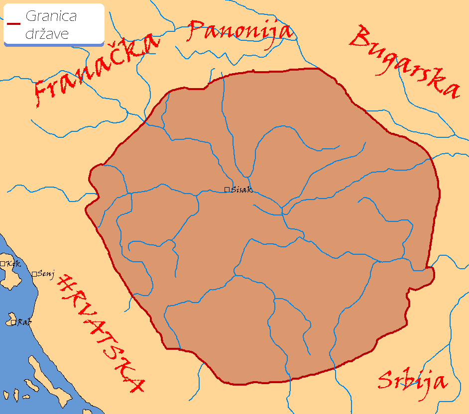 Мапа којом је Љутевид Посавски владао.